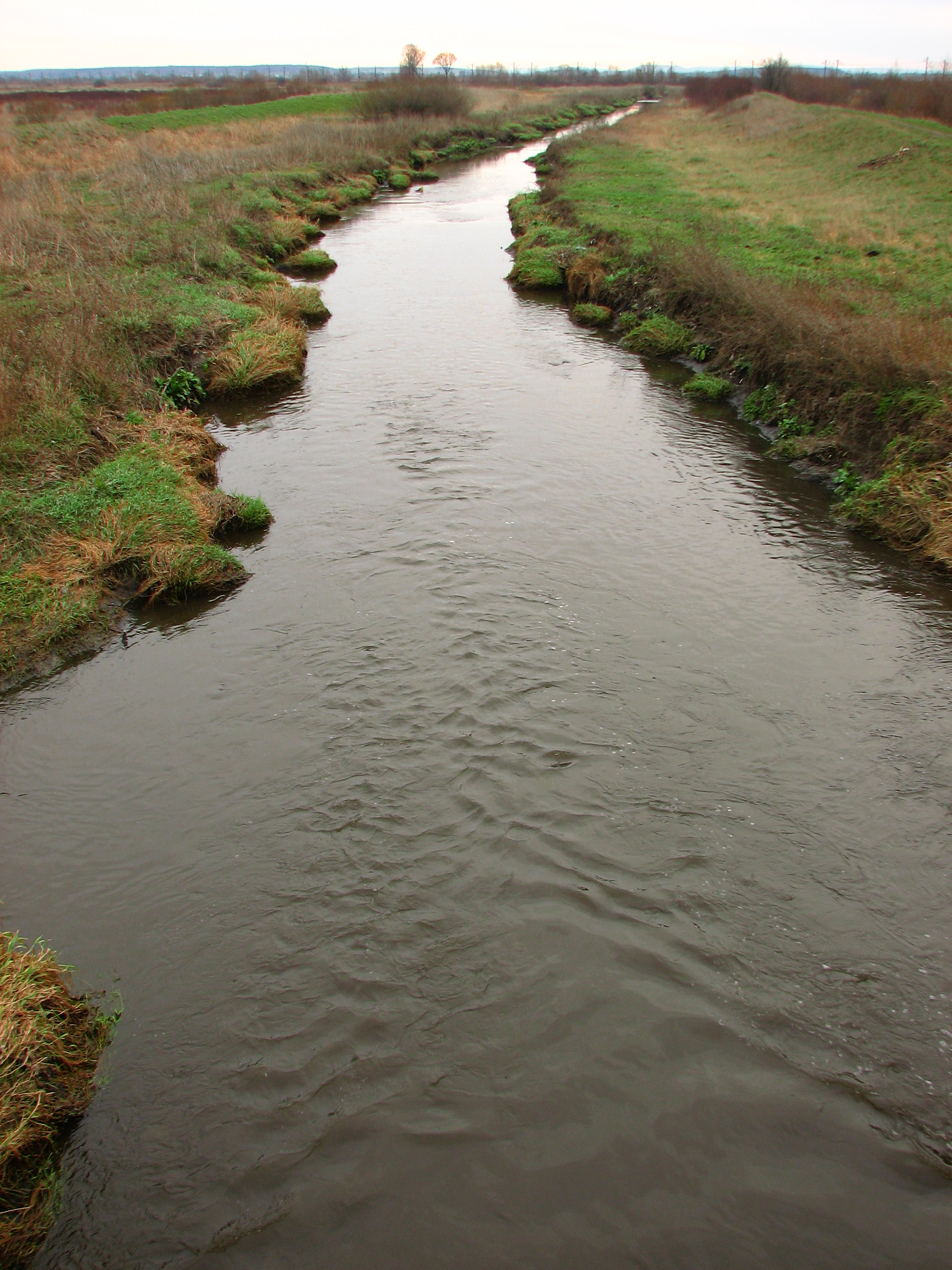 р. Полтва.